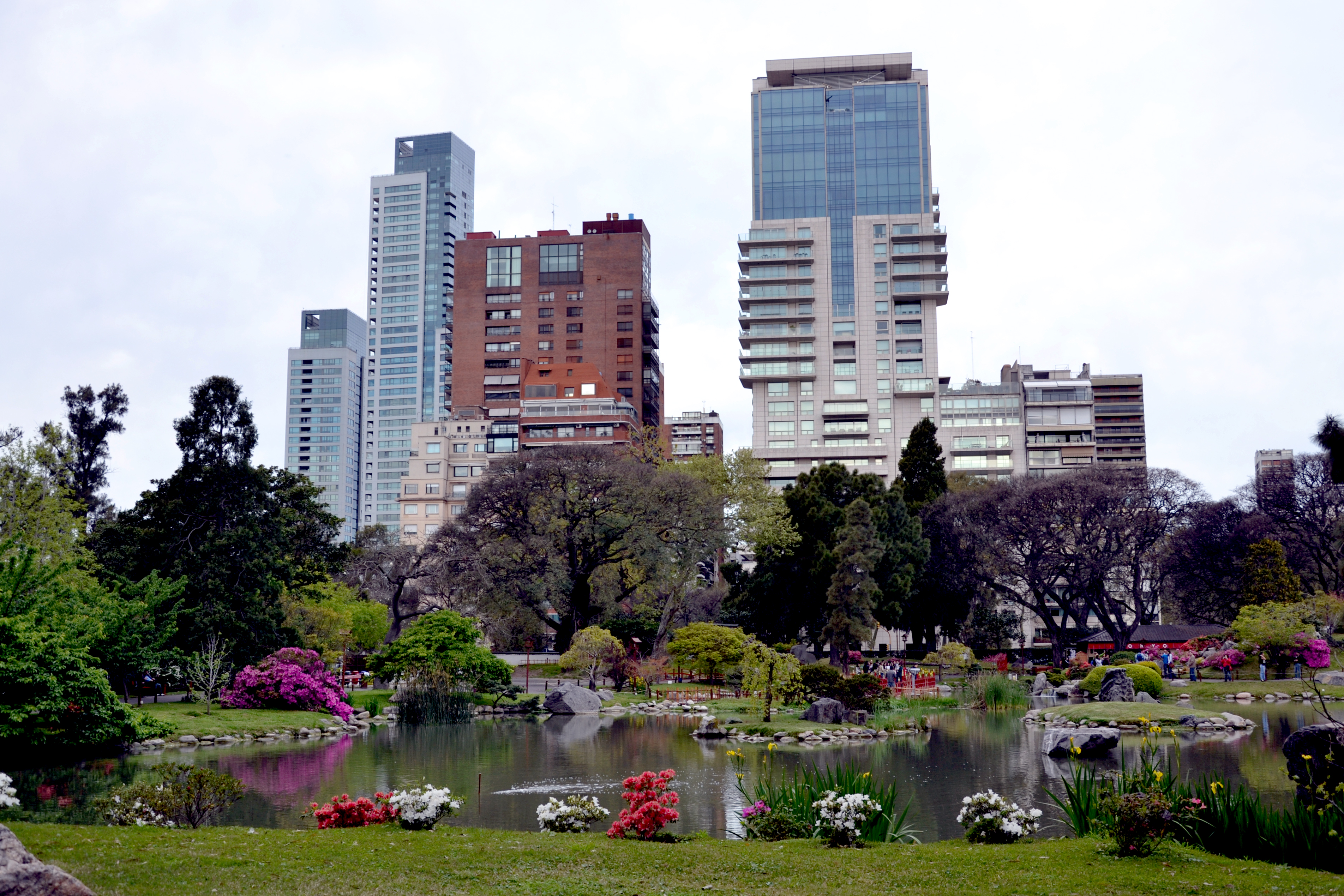 Jardin Japonés de Buenos Aires.